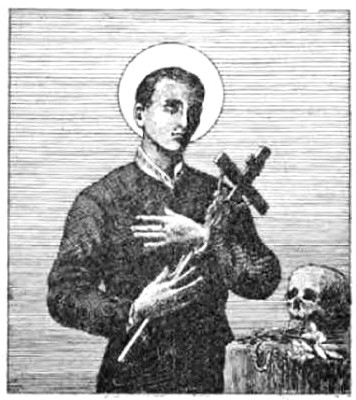 Image de la page 714 de la "Vie des Saints" en langue bretonne. Écrit par Yann-Vari Perrot et publié en 1912.